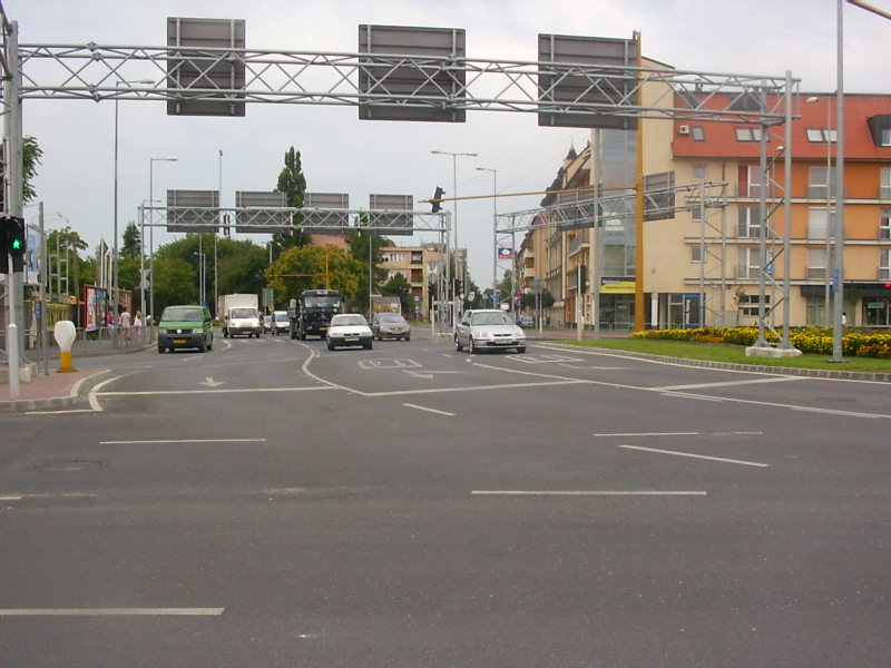 Körgeometriás csomópontban a jelzőlámpa irányváltására várva (Győr)